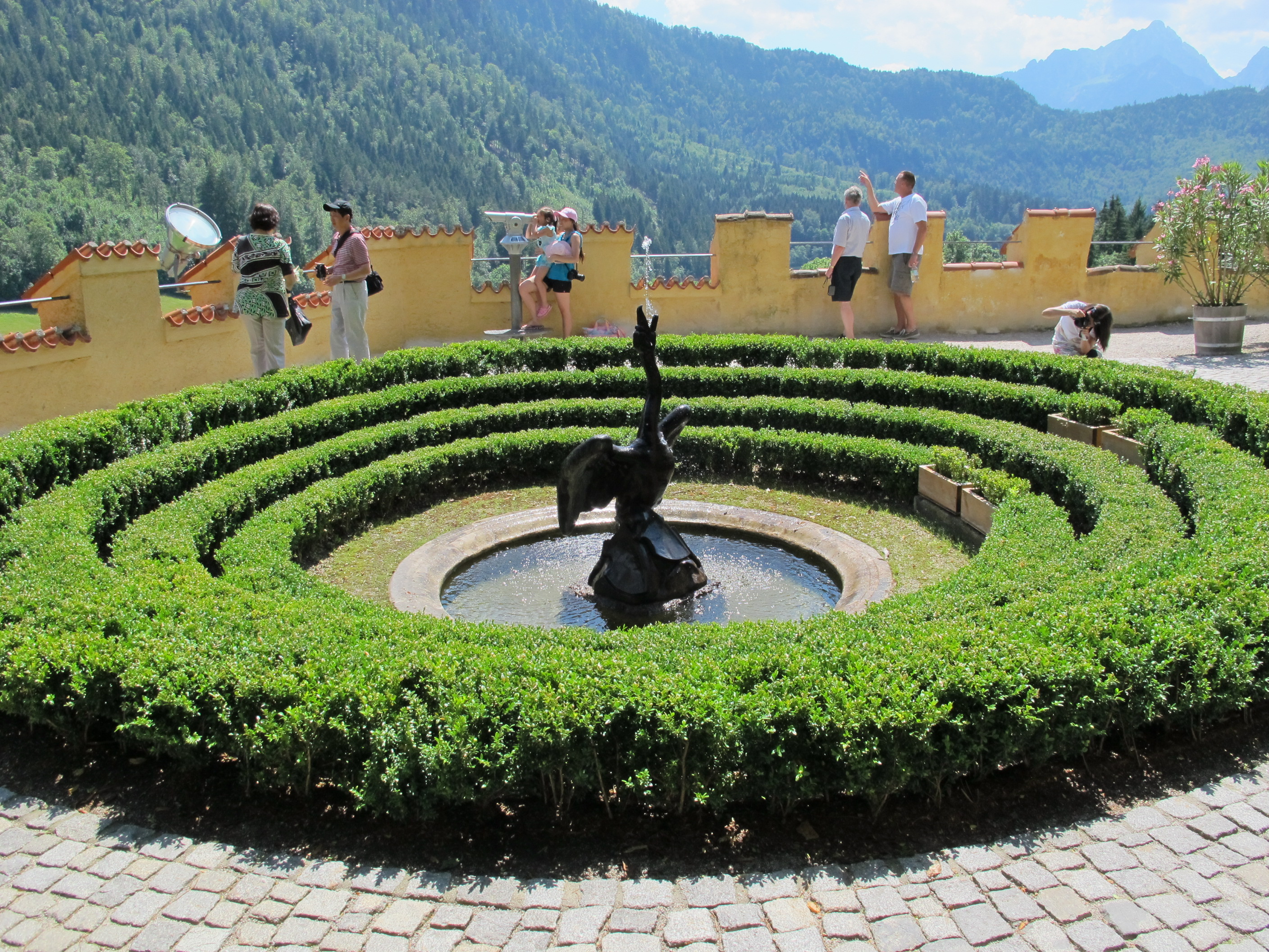 Hohenschwangau schloss, giardini